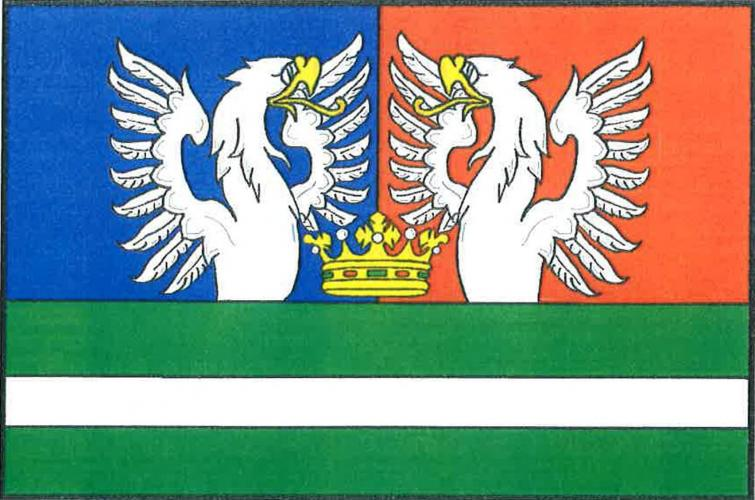 Orličky vlajka